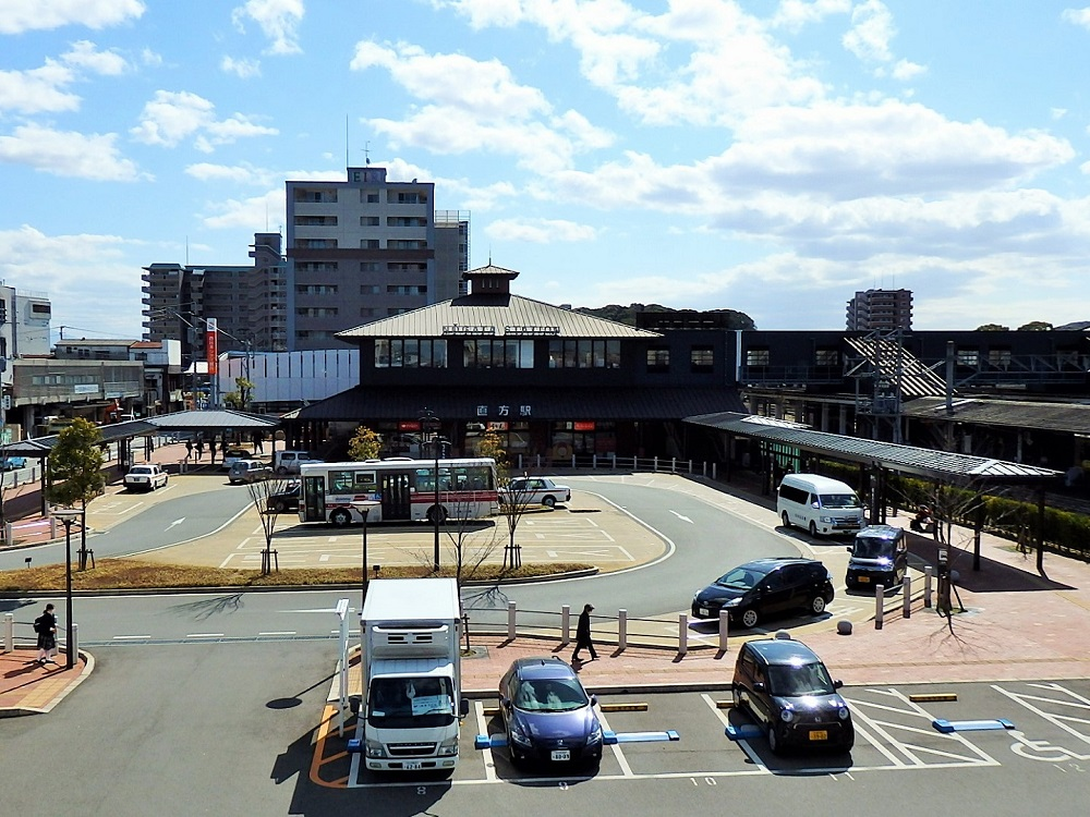 2017年2月、直方市にて撮影。